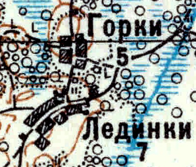 Топографическая карта Ленинградской области, квадрат VIc-27 (Залустижье), деревня Лединки